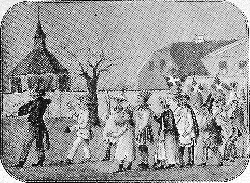 Fastelavnsoptog fra omkring midten af 1800-tallet på Frederiksberg Runddel.